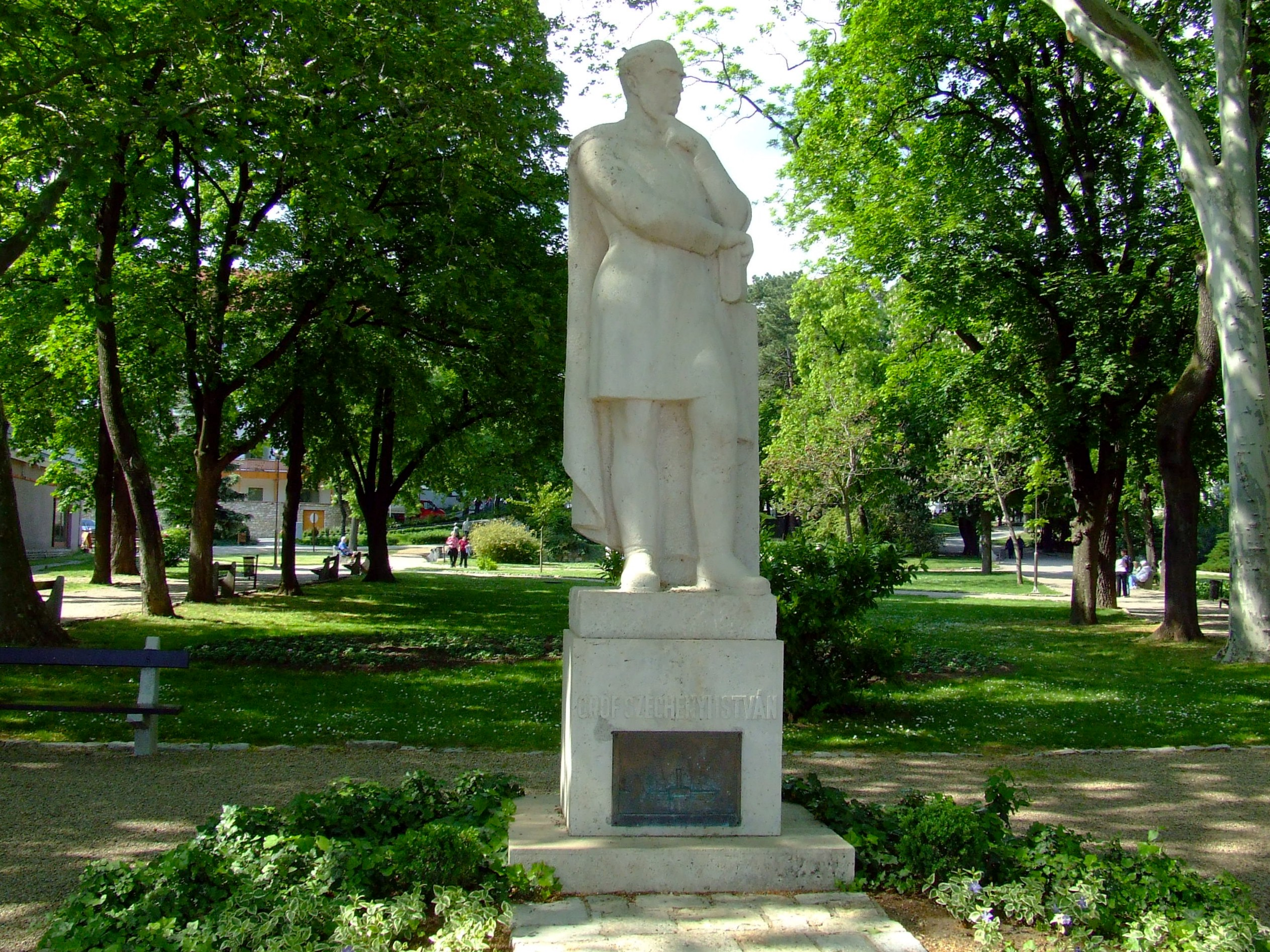 Széchenyi István szobra Balatonfüreden. Andrássy Kurta János alkotása (1941)